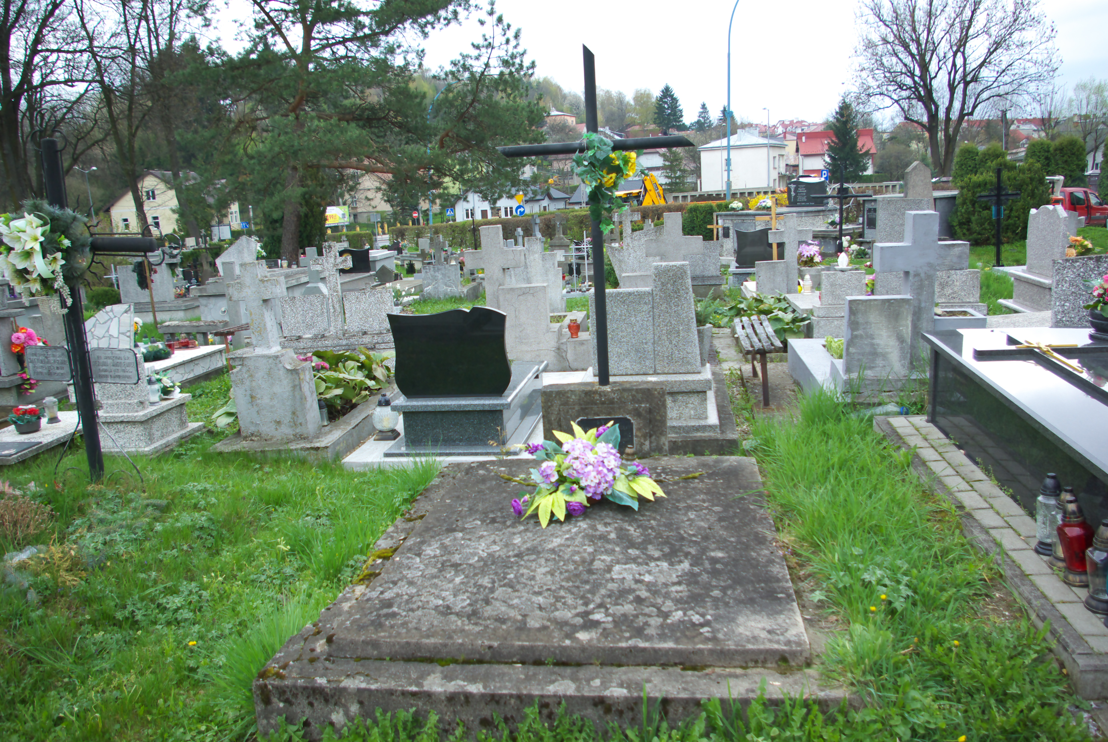 Grobowiec rodziny Gilewicz w części „Matejki Stary” Cmentarza Centralnego w Sanoku